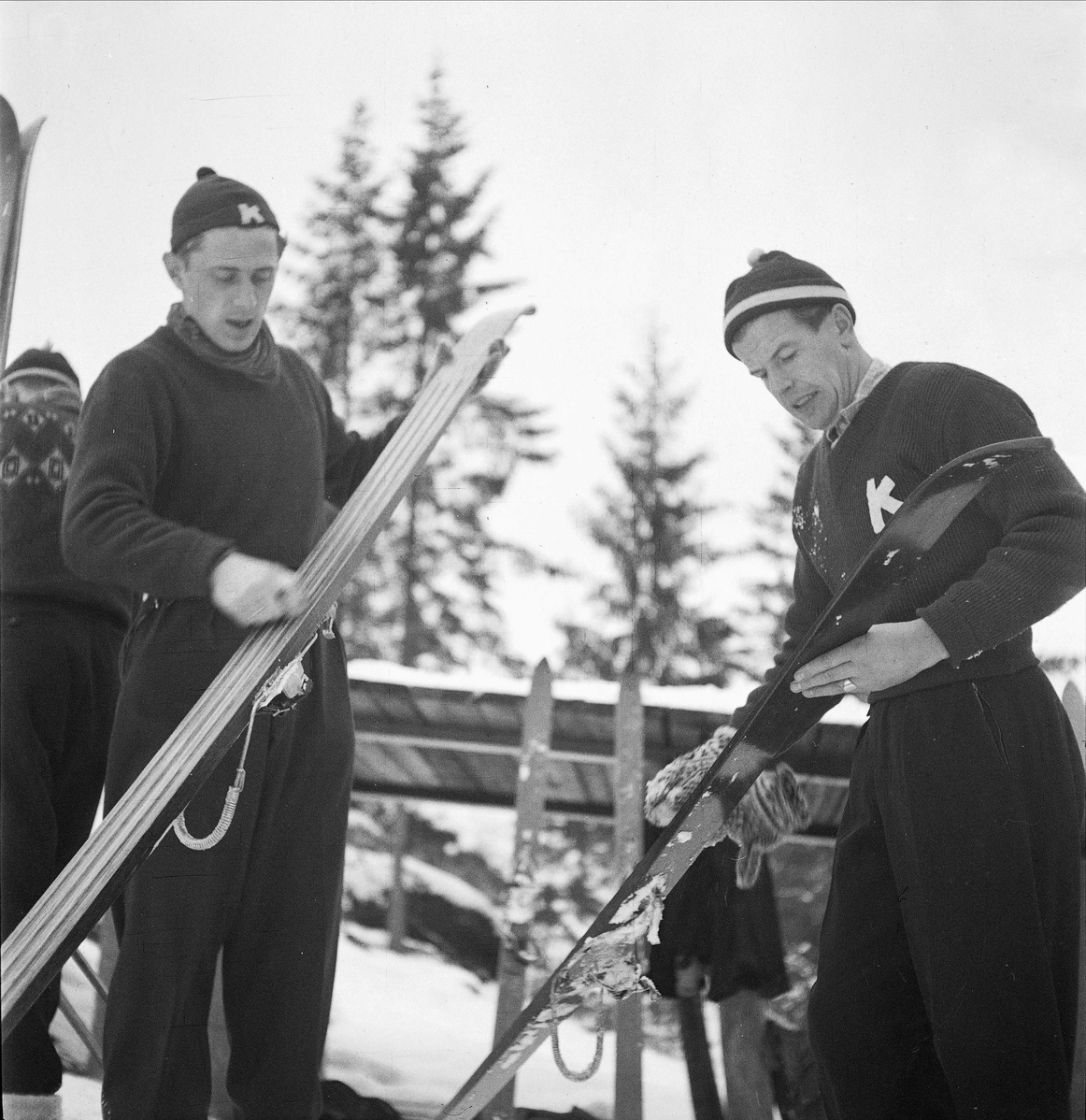 Norwegian ski jumpers Petter Hugsted (left) and Asbjørn Ruud (right)